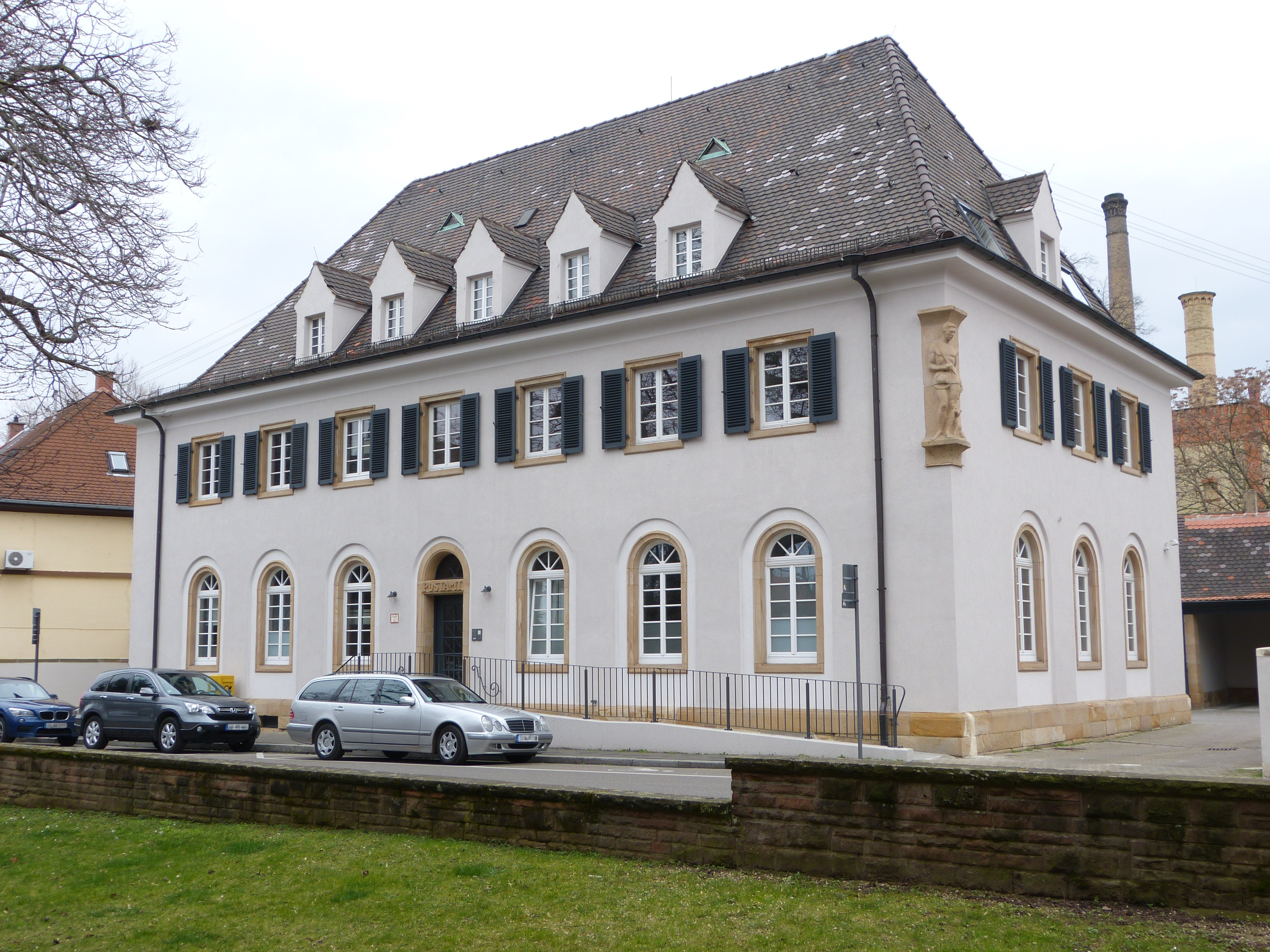 Ludwigshafen-Oggersheim Postamt Am Speyerer Tor 2: repräsentativer hausteingegliederter Walmdachbau, expressionistische Motive, bauzeitliche Remise, 1927, Architekt Heinrich Schneider